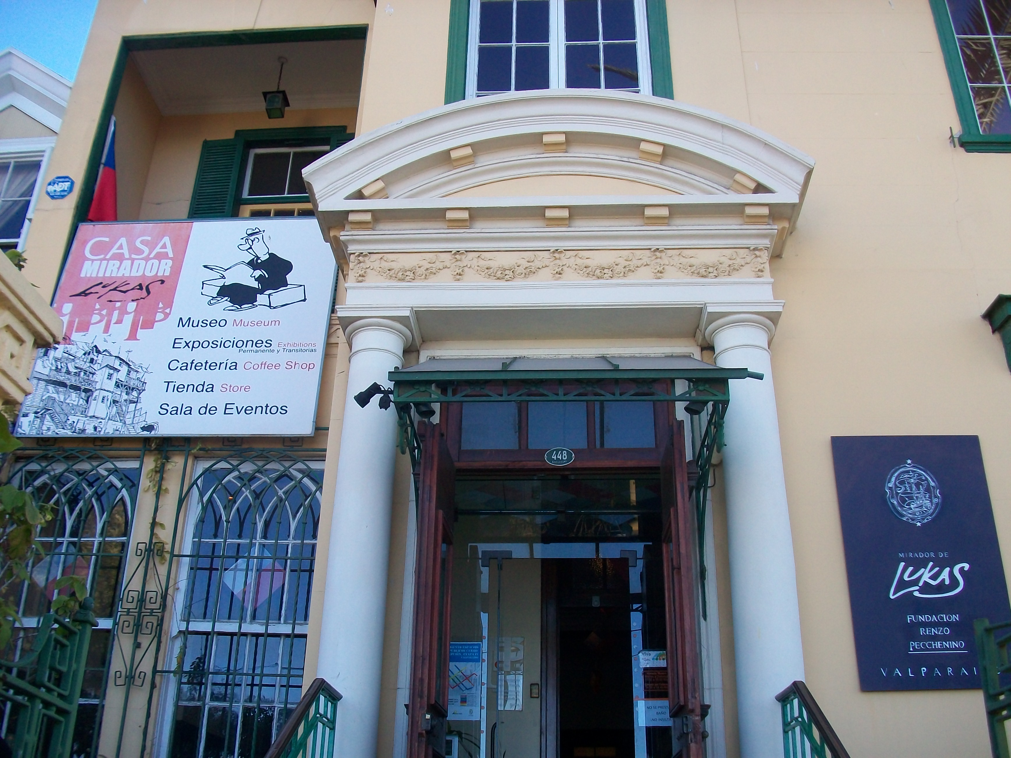 Más conocida como casa de Lukas, ubicada en el paseo Gervasoni en Cerro Concepción This is a photo of a national monument in Chile: 606